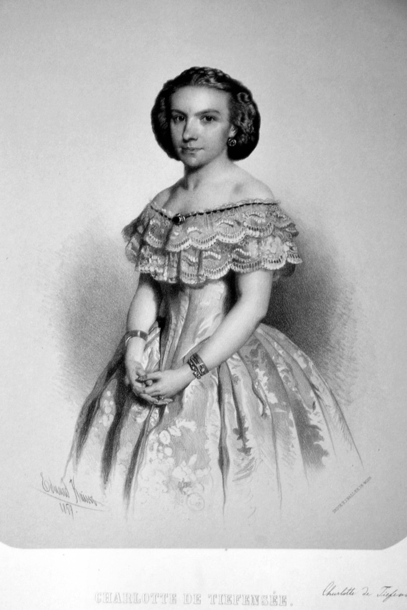 Charlotte Tiefensee (1827 . nach 1878), österreichische Opernsängerin. Lithographie von Eduard Kaiser, 1859